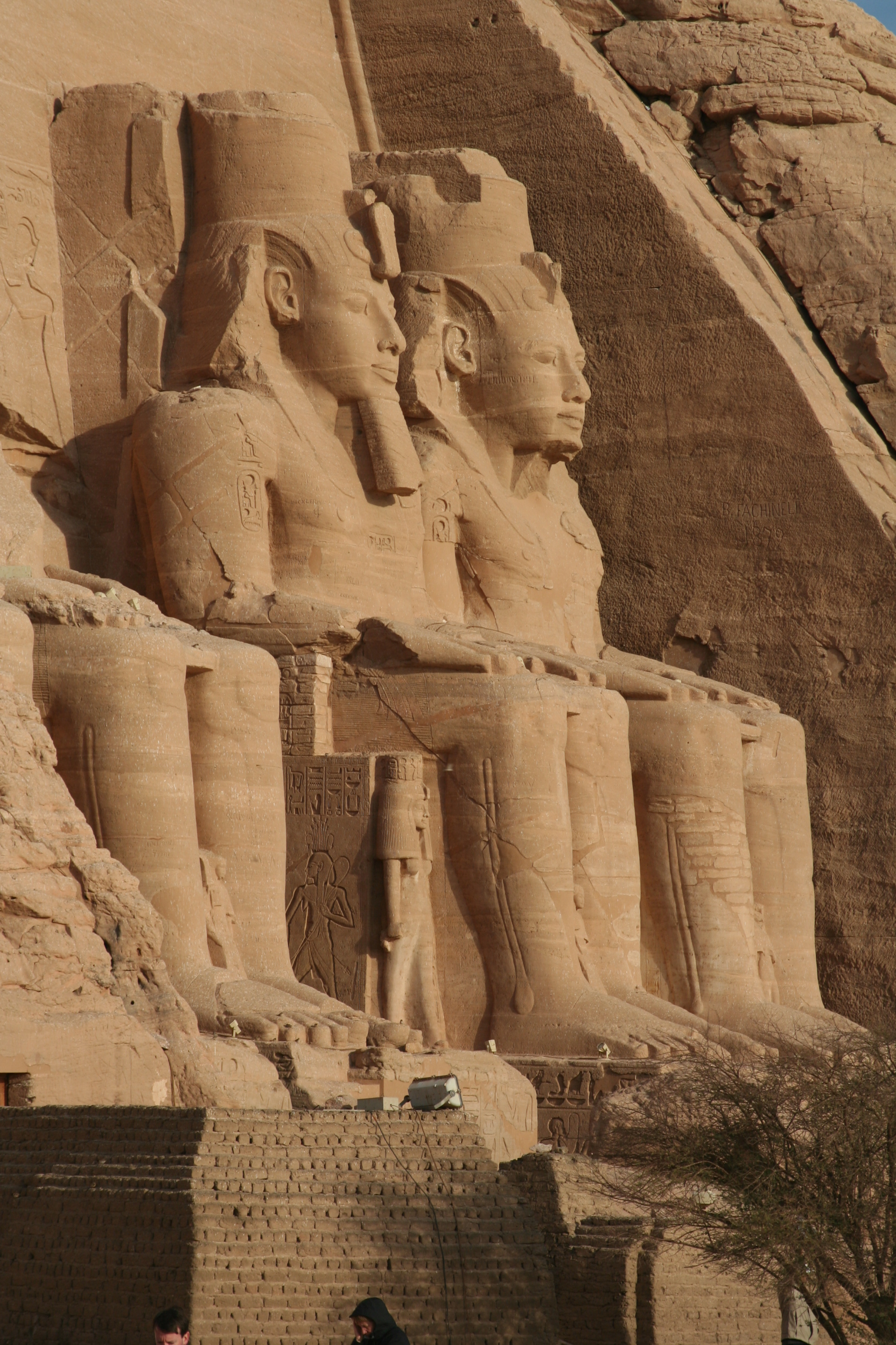 Abu simbel - detail Rameses II Temple